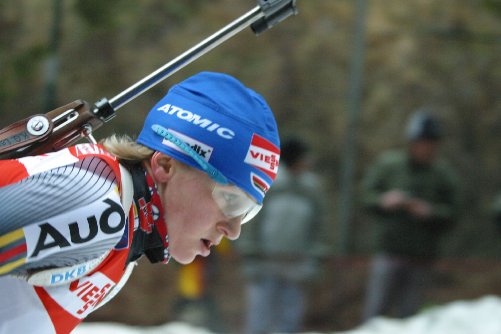 Martina "Molly" Glagow Biathlon Verfolgung der Damen in Oberhof 2007